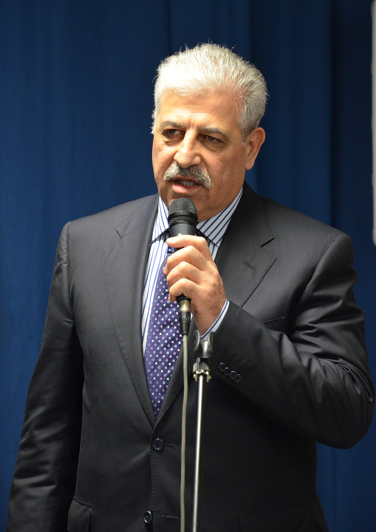 Athiel al-Nudschafi, der Gouverneur der nordirakischen Provinz Ninive, betonte in seiner Gastrede, daß er über Wirtschaft und Soziales reden möchte, über Vergebung und einen gemeinsamen Wiederaufbau des gesamten Iraks ...